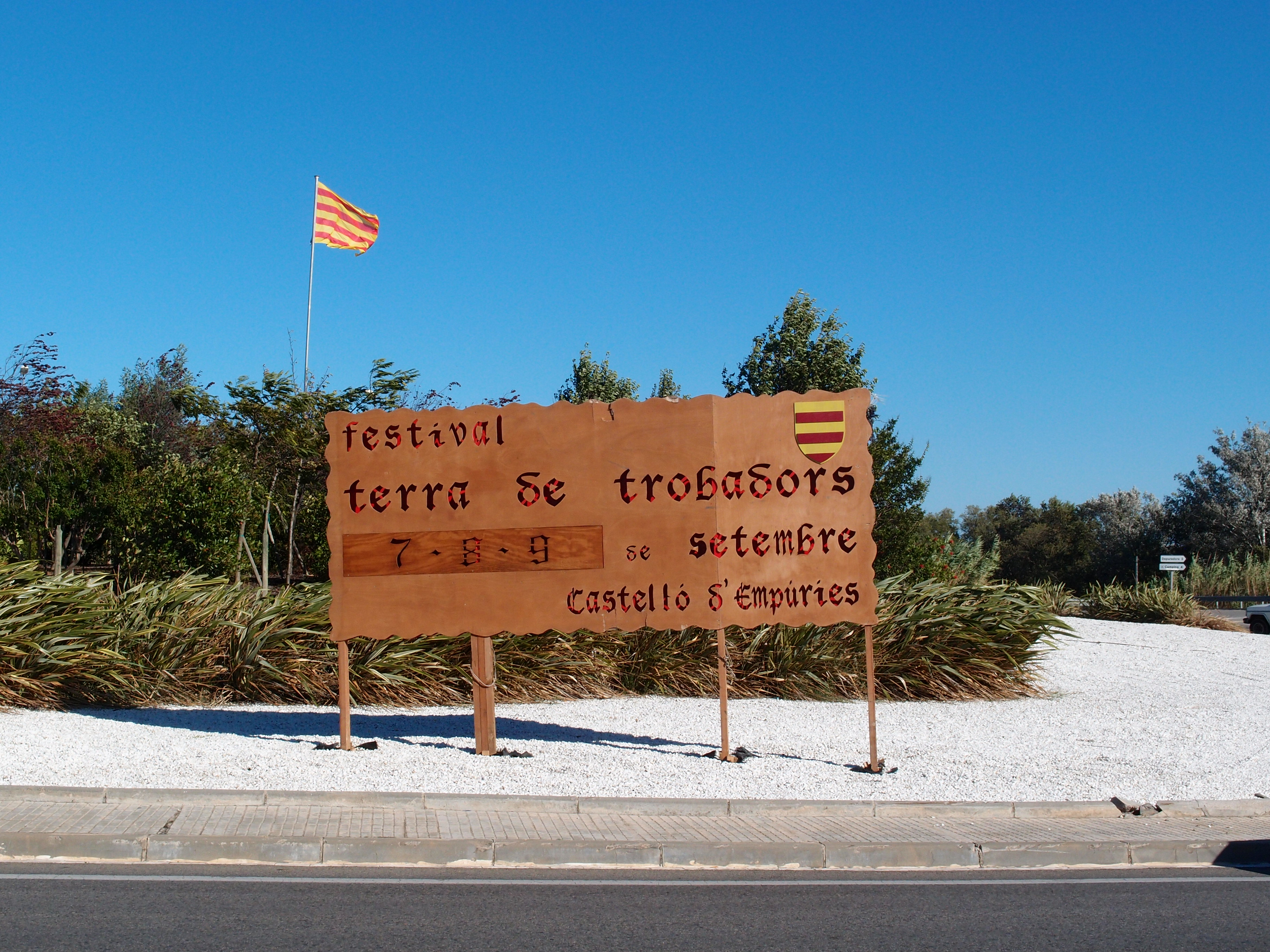 Festival Terra de Trobadors/2012 in Castelló d’Empúries (Katalonien/Spanien) Datum: 13.09.2012 Urheber: M. Pfeiffer alias Benutzer:Gordito1869 Quelle: privates Fotoarchiv des Urhebers